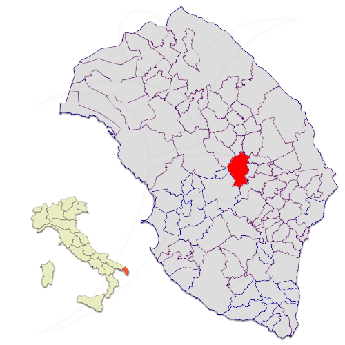 Il territorio del comune di Corigliano d'Otranto nella provincia di Lecce